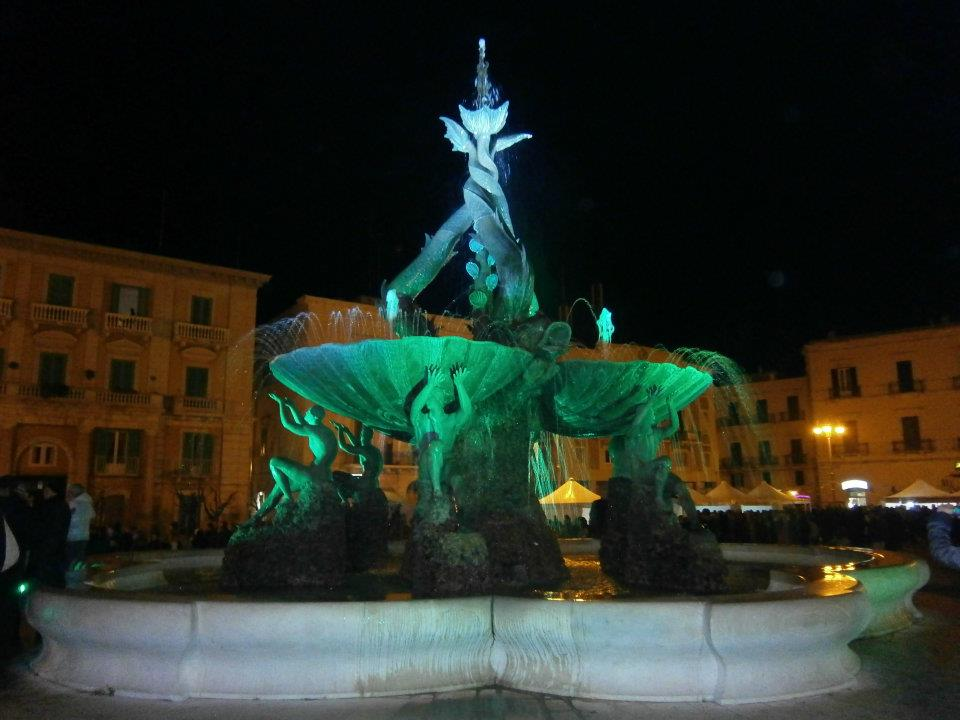 Fontana dei Tritoni, Giovinazzo